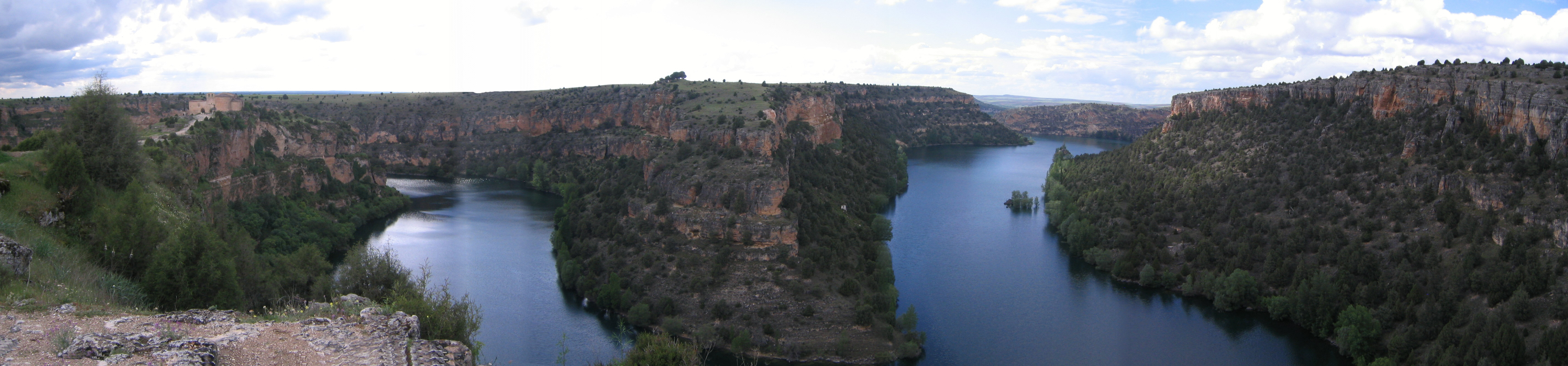 Hoz de San Frutos el Parque Natural de las Hoces del Río Duratón (Sepúlveda, Segovia España), la ermita se puede ver a ala izquierda.